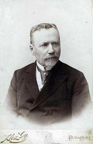 Korányi Frigyes (1828–1913) orvos, egyetemi tanár a Magyar Tudományos Akadémia levelező tagja portréja. Klösz György műtermében készül tfénykép